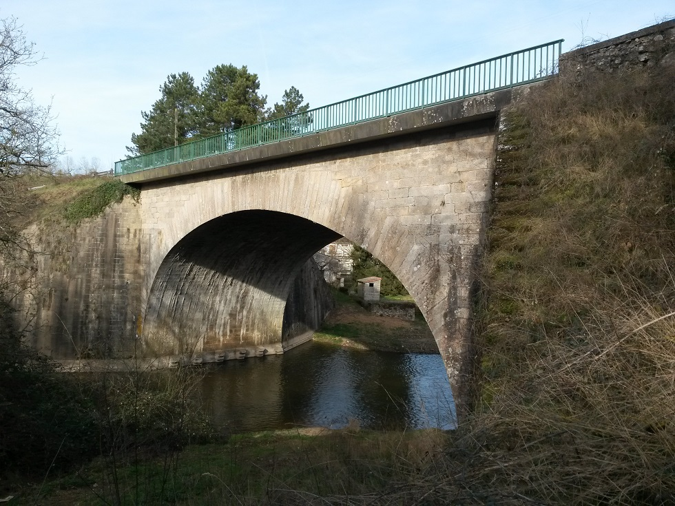 Pont-Charron, RD 137 sur le Grand Lay dans la commune de Chantonnay (Vendée).